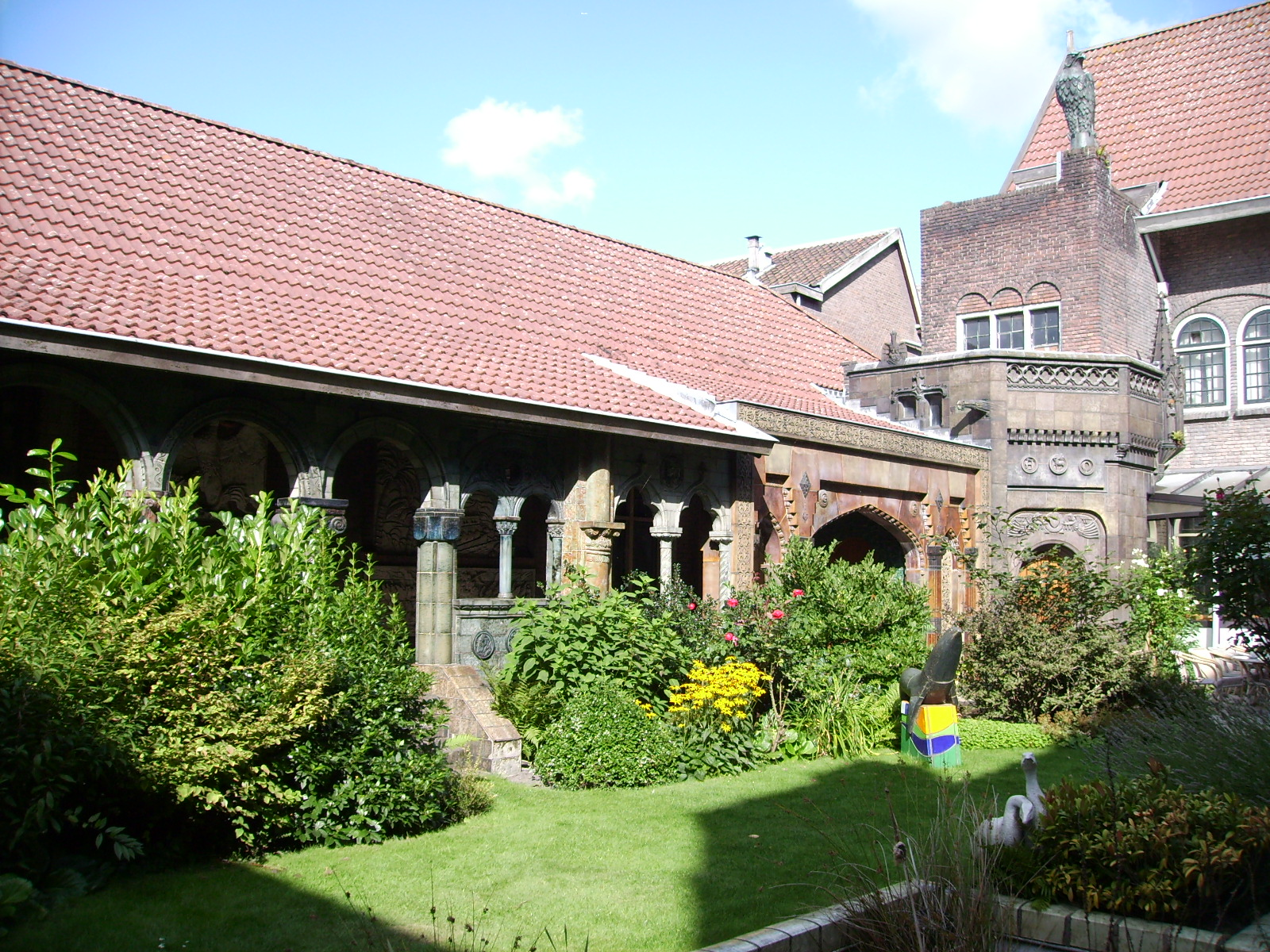 Innenhof des Hauptgebäudes. De Porceleyne Fles (vollständig De Koninklijke Delftsche Aardewerkfabriek „De Porceleyne Fles Anno 1653“ N.V., dt. wörtl. Die Königliche Porzellanflasche, engl. bekannt als Royal Delft) ist eine Delfter Porzellanmanufaktur mit einem Porzellanmuseum. Die 1653 gegründete Manufaktur ist ursprünglich für ihre als Delfter Blau oder Delfter Ware bezeichneten Fayencen bekannt.